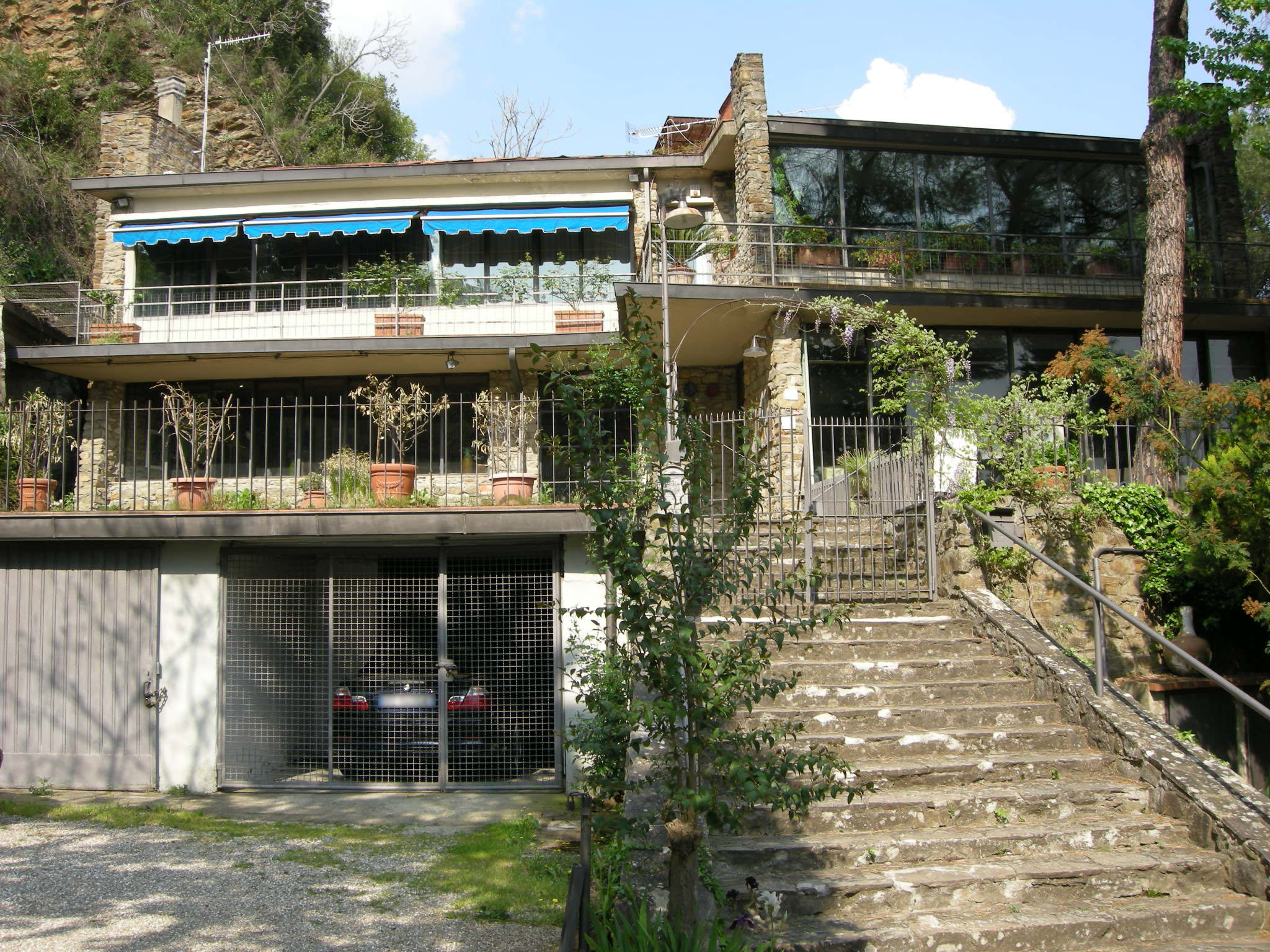 Complesso di monterinaldi